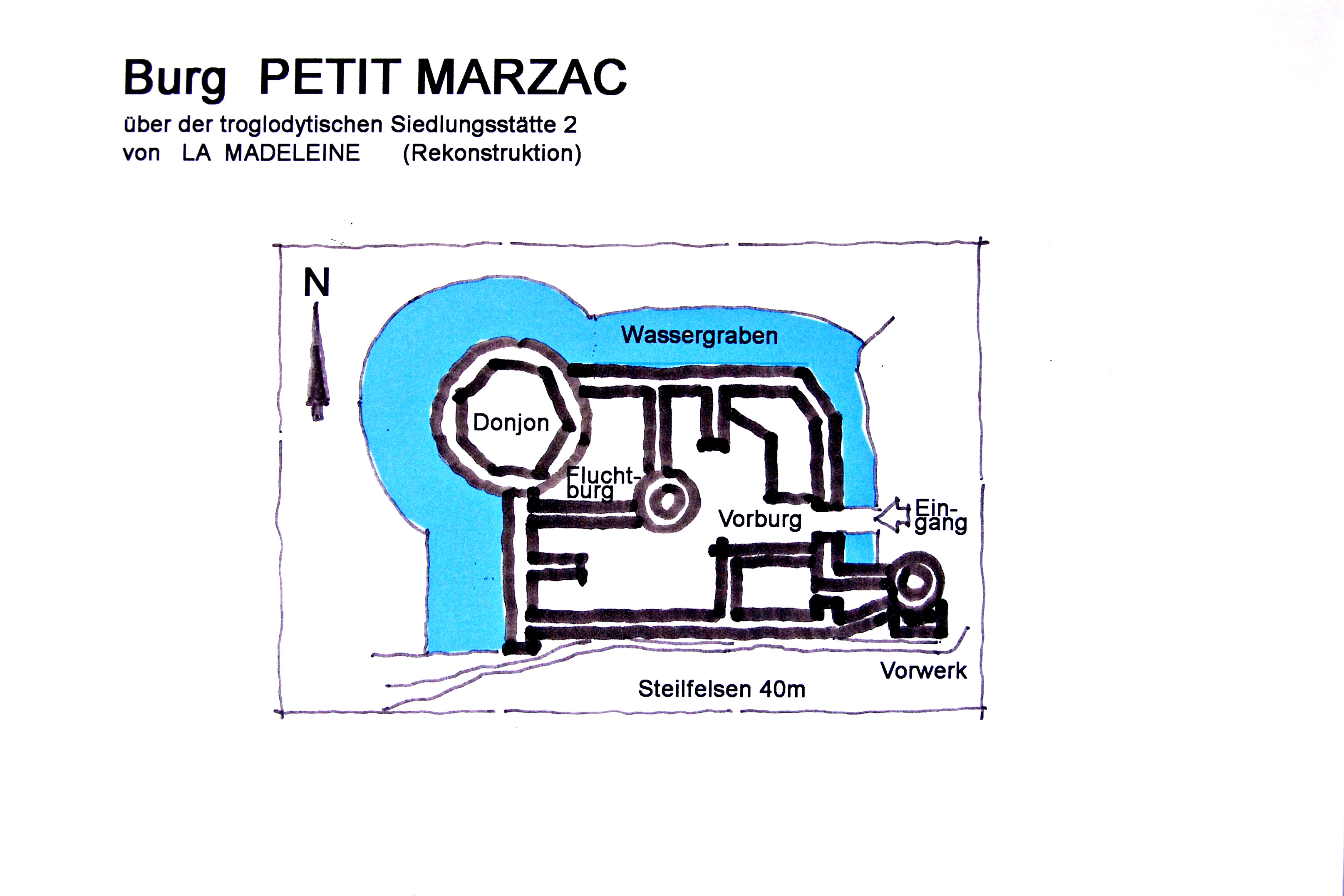 Archäologischer Fundplatz „La Madeleine“ in Frankreich: Rekonstruktionszeichnung der Burg Petit Marzac, Vésère